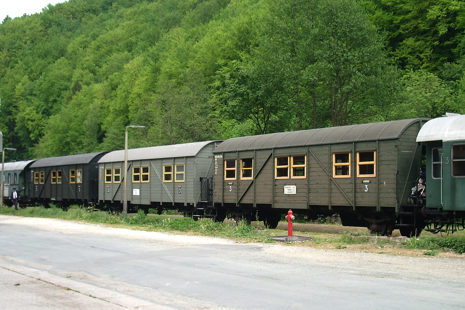 Drei Behelfspersonenwagen MCi der Dampfbahn Fränkische Schweiz (DFS) am 13.05.2007 im Bahnhof Behringersmühle